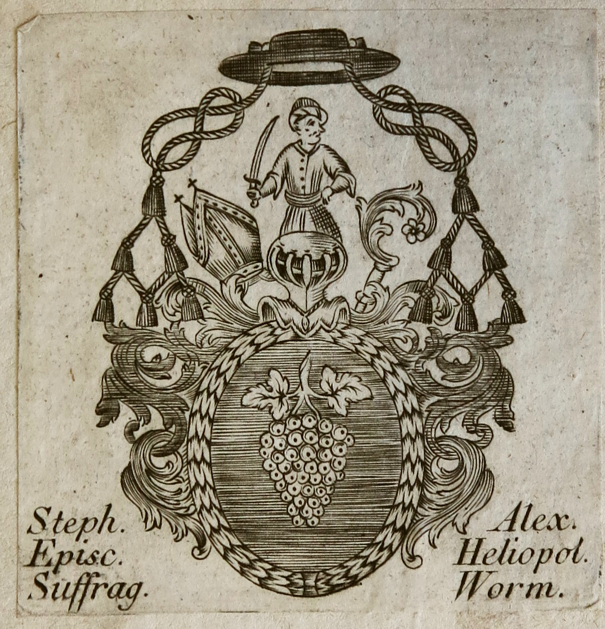 Exlibris Stephan Alexander Würdtwein. Aus: Volumen Secundum Rervm Mogvntiacarvm, Quo Continentur Excerpta Ex PP. Antverpiensium Actis Sanctorum, Nec Non Ioannis Mabillon Actis Sanctorum Ordinis Benedictini, Ad Quorundam Sanctorum & Antistitum Moguntinensium Historiam Facientia; ... Frankfurt: Sande, 1722. Wissenschaftliche Stadtbibliothek Mainz. Signatur: Mog:2°/ 20c, Bd. 2